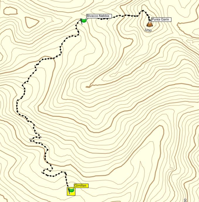 Visualizzazione dell'ascesa alla Punta Garin partendo da Gimillan e passando per il Bivacco Nebbia - Alpi Graie - Valle d'Aosta - Italia